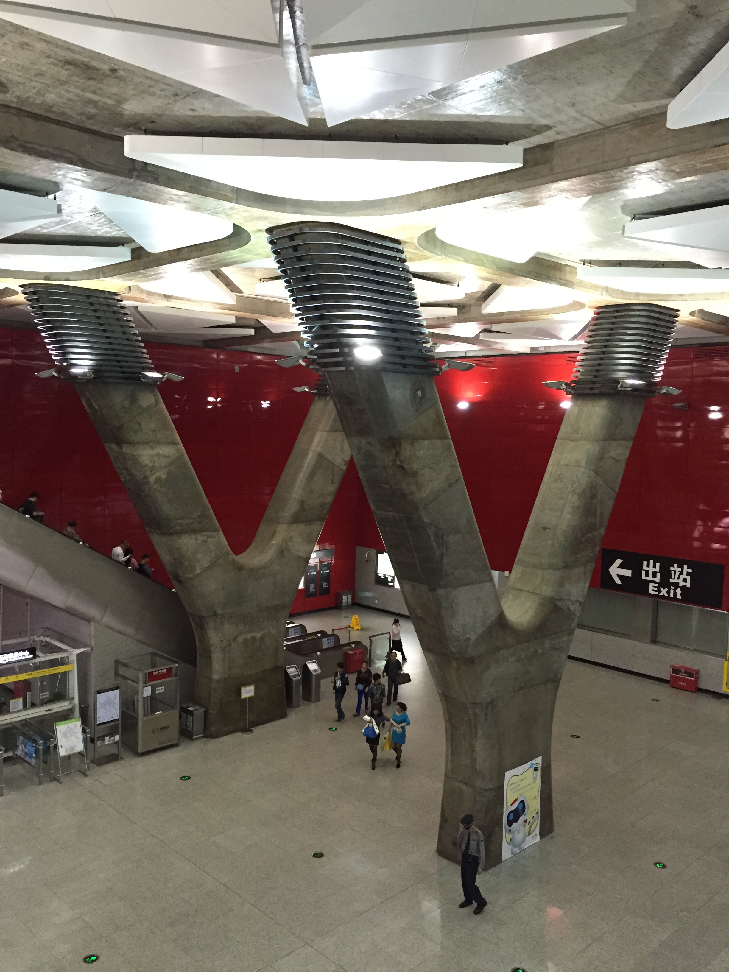 广州地铁动物园站站厅